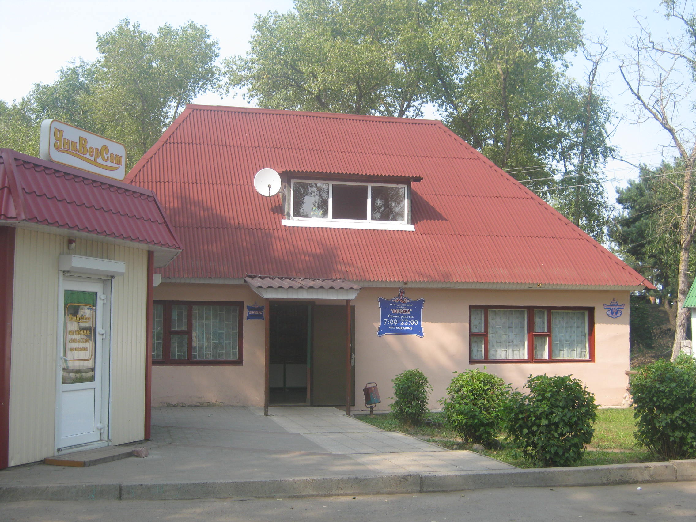 учцскеврекорчсвы